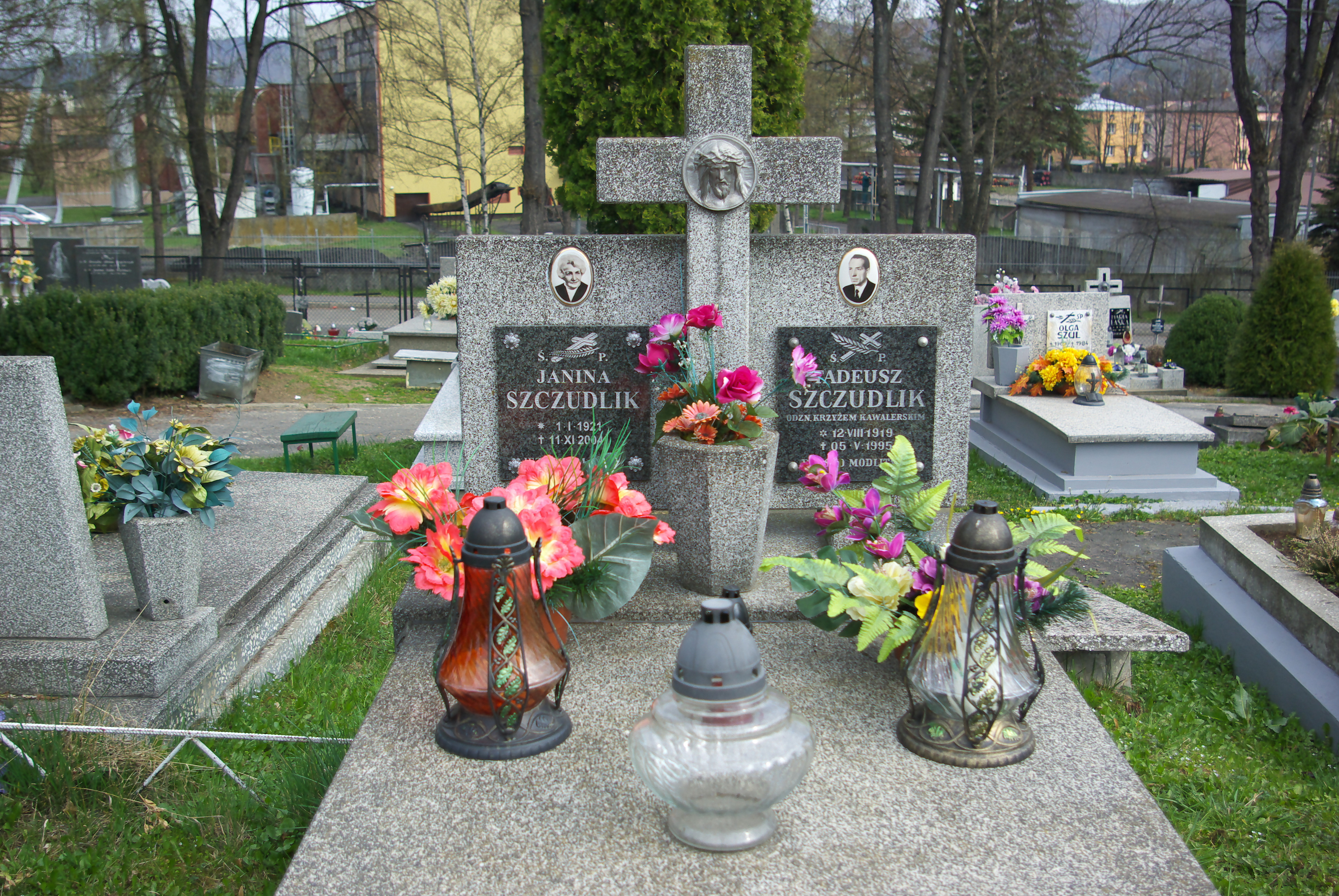 Grobowiec Janiny i Tadeusza Szczudlików na Cmentarzu Centralnym w Sanoku.